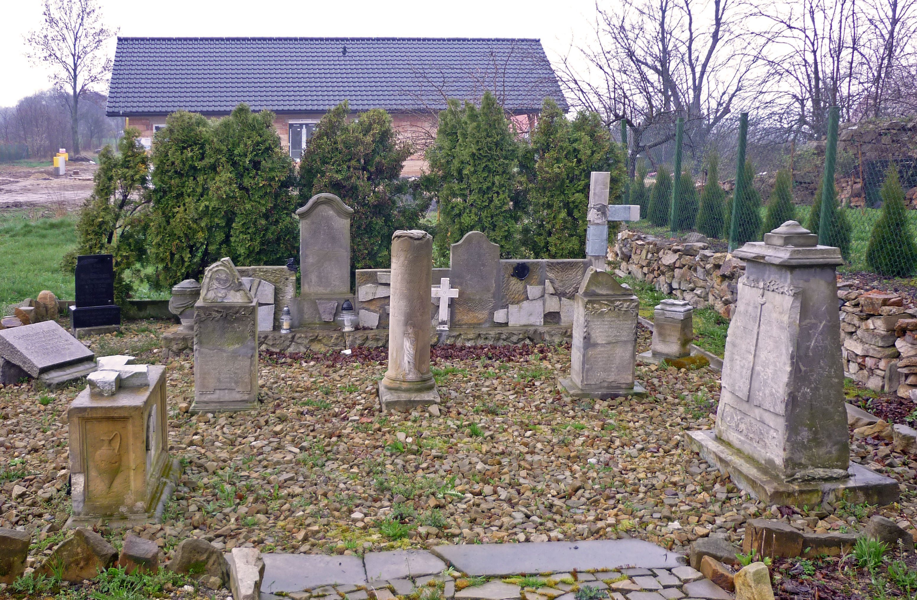 Lapidarium in Wiesa (Wieża) bei Greiffenberg (Gryfów) in der polnischen Oberlausitz